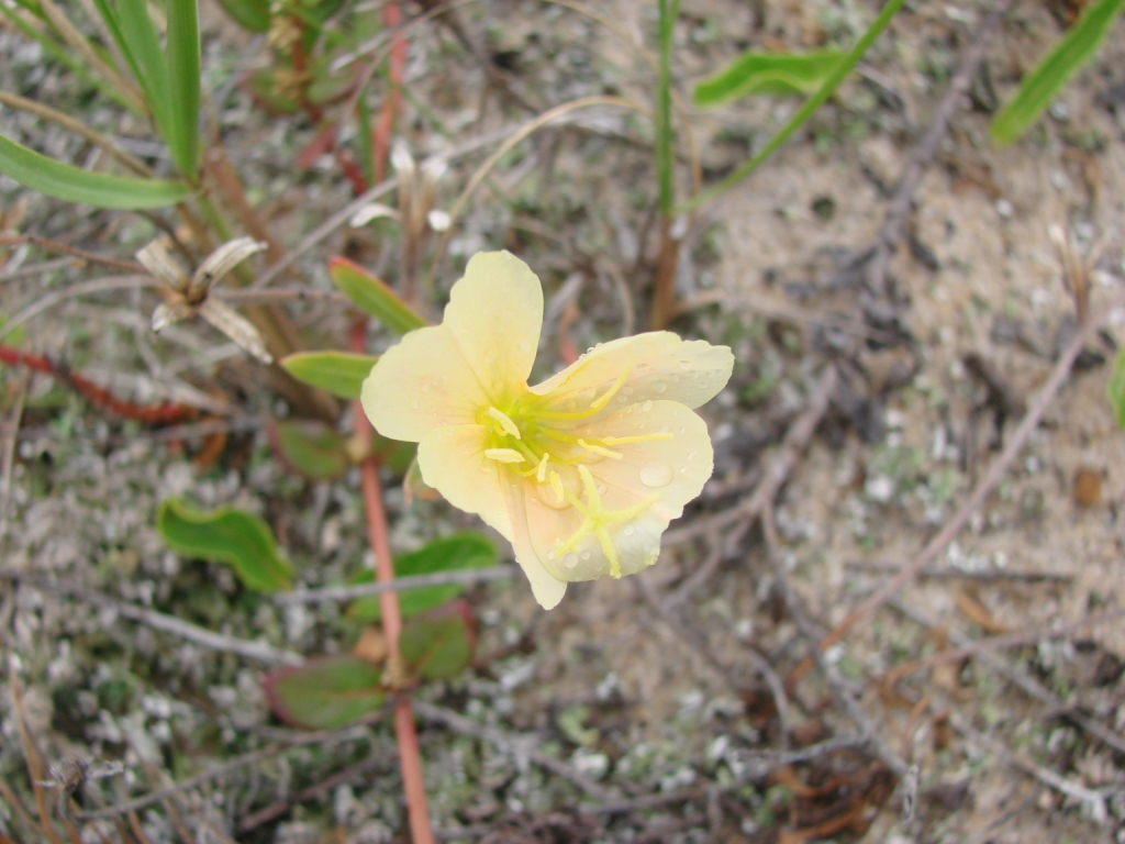 Oenothera mollissima - ONAGRACEAE - Praia do Mo�ambique - Florian�polis - SC - Brasil